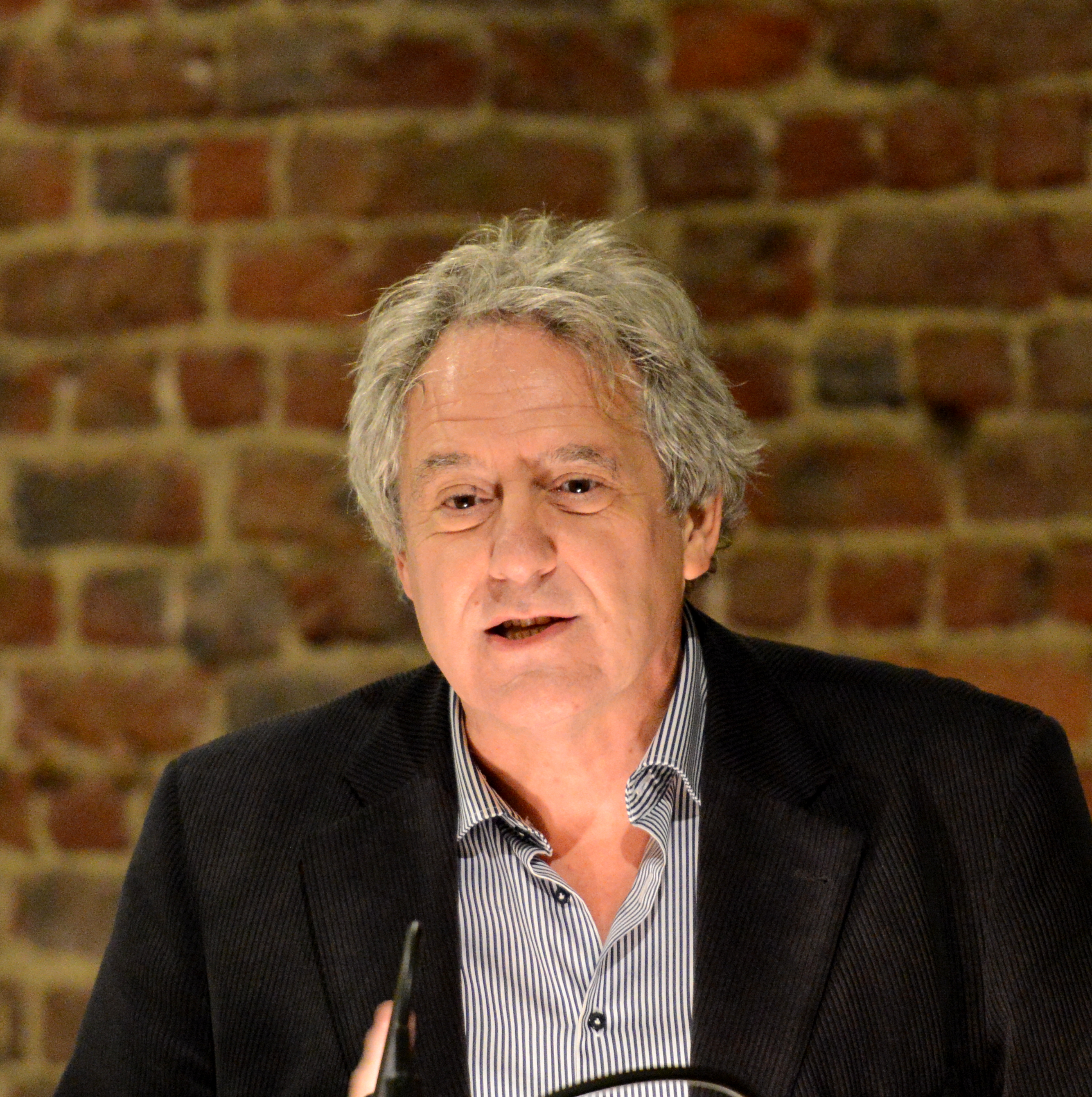 De Jean Back bei der Presentatioun vun der Germaine Goetzinger hirem Buch Wuertwiertlech. 57 Rieden, den 11. November 2013 am Waassertuerm + Pomhouse zu Diddeleng.